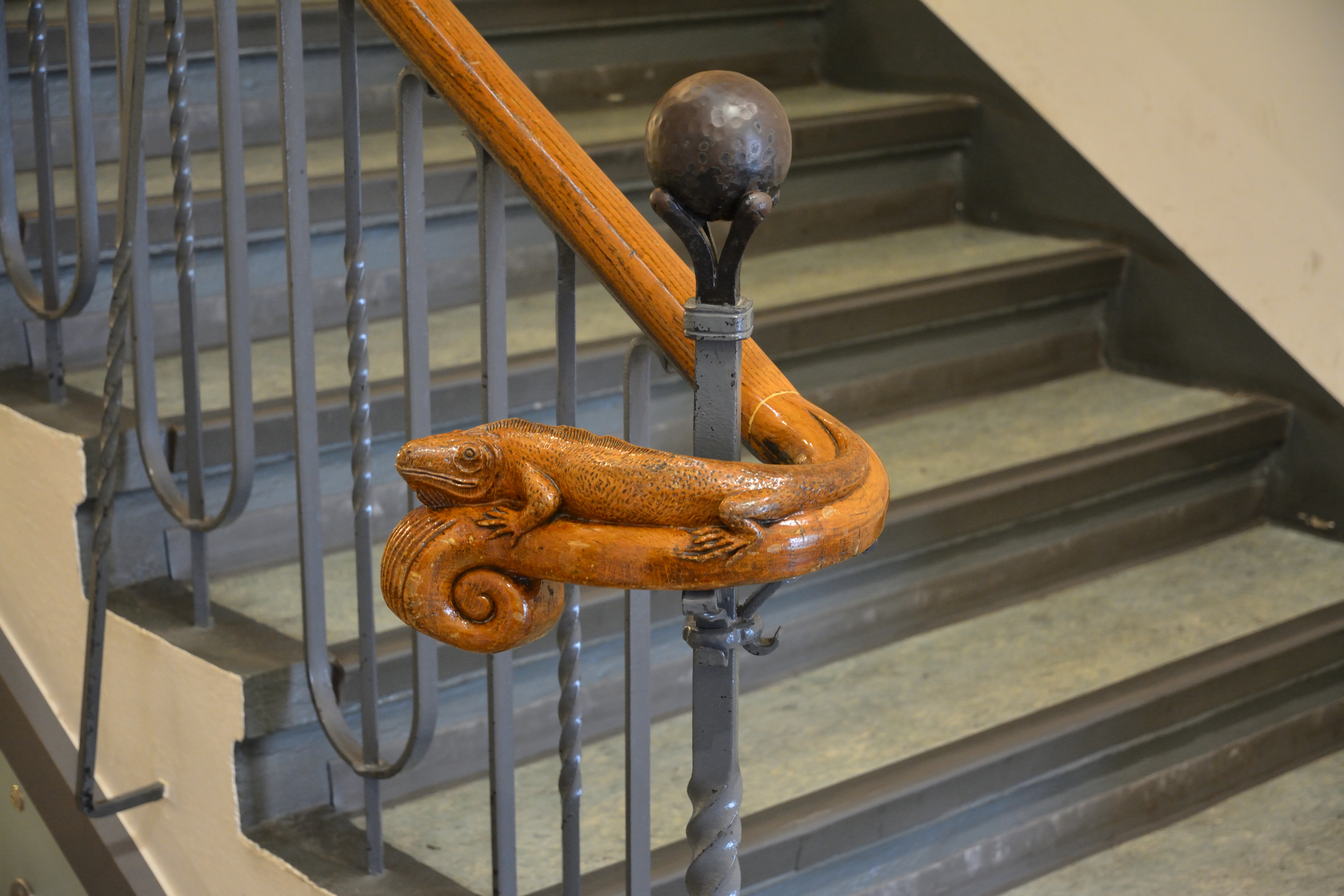 Impressionen einer GLAM on Tour (2018) im Senckenberg Museum für NaturkundeHier: Ein Handlauf einer Treppe im Museum